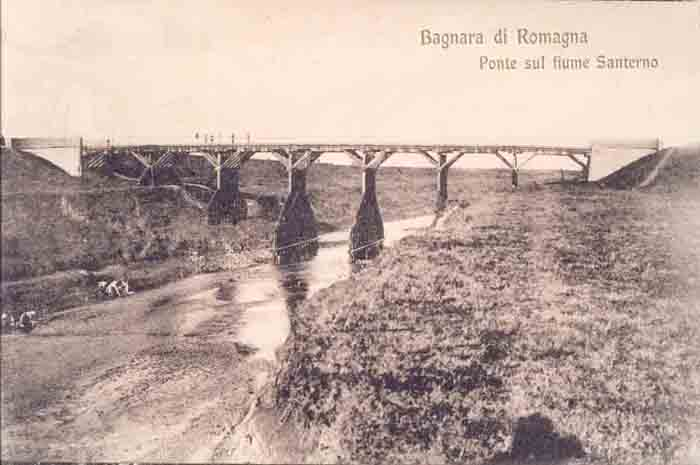 fotografia raffigurante il vecchio ponte sul fiume santerno (tra Bagnara di Romagna e Mordano), interamente distrutto durante un bombardamento.